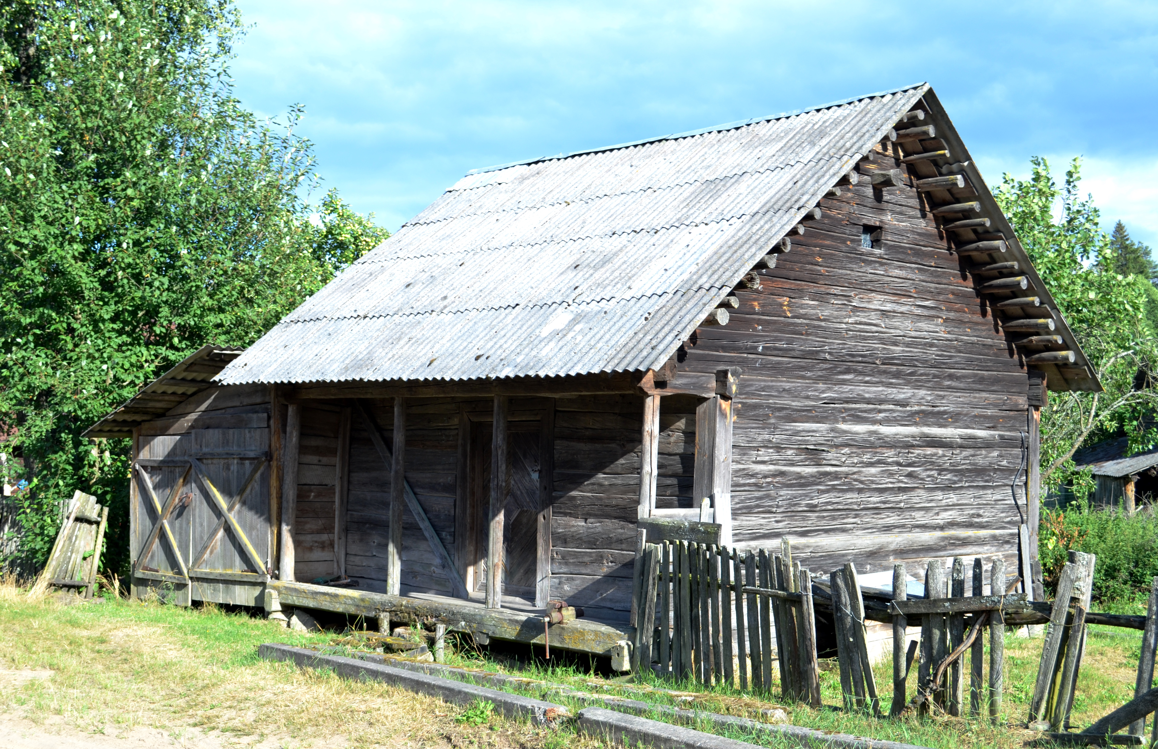 Klėtis Musteikoje, Varėnos r.